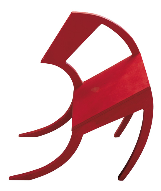 Neuauflage (2006) des Classroom Chair von Stefan Wewerka (1970). Holz, rot gespritzt.